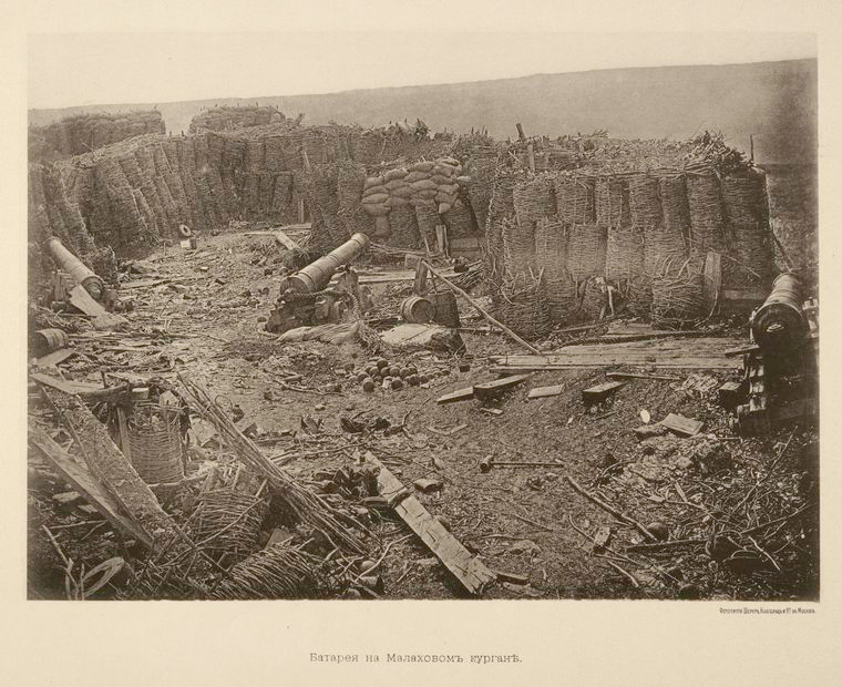 Крымская война 1853—1856. Батарея на Малаховом кургане.